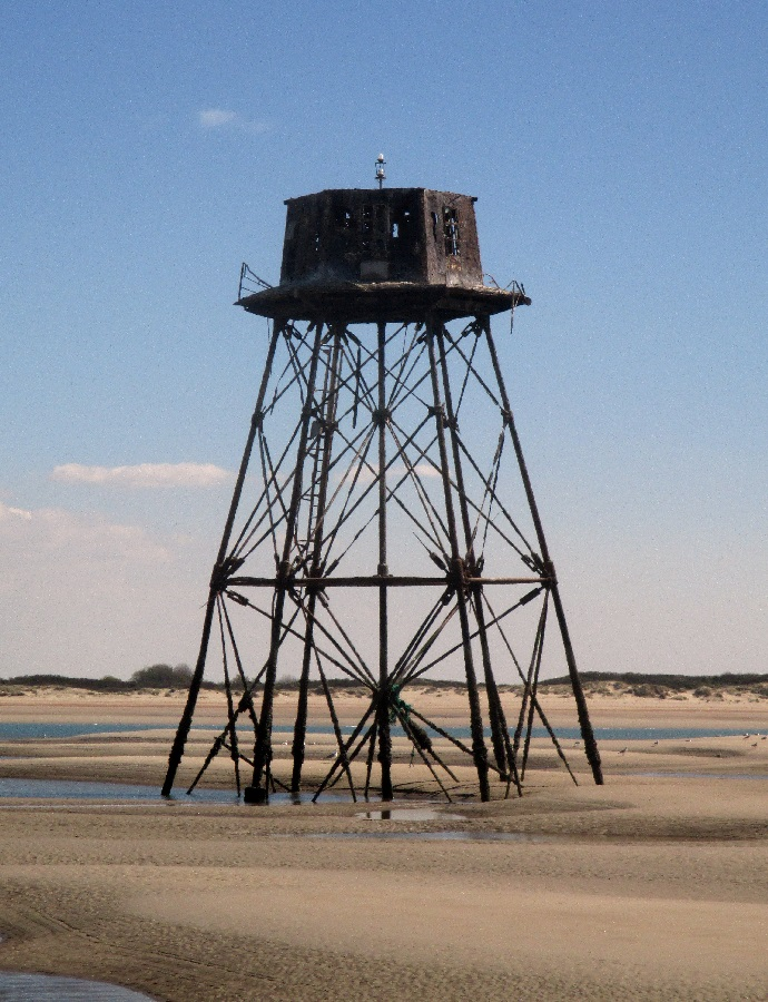 Phare désaffecté, près de Calais, France